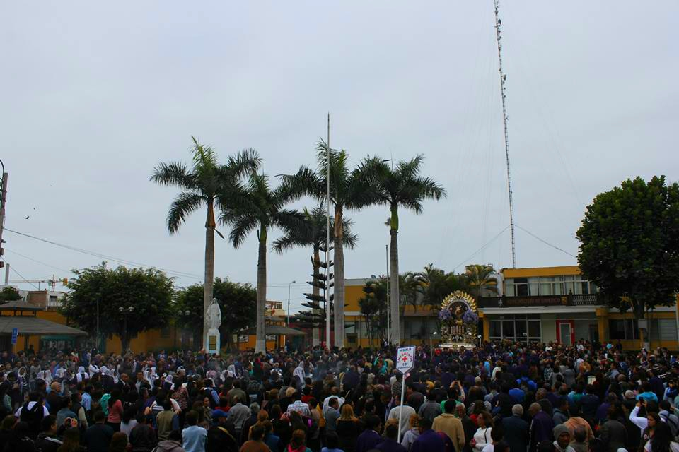 El Señor de los Milagros de Barranco en la Municipalidad del Distrito